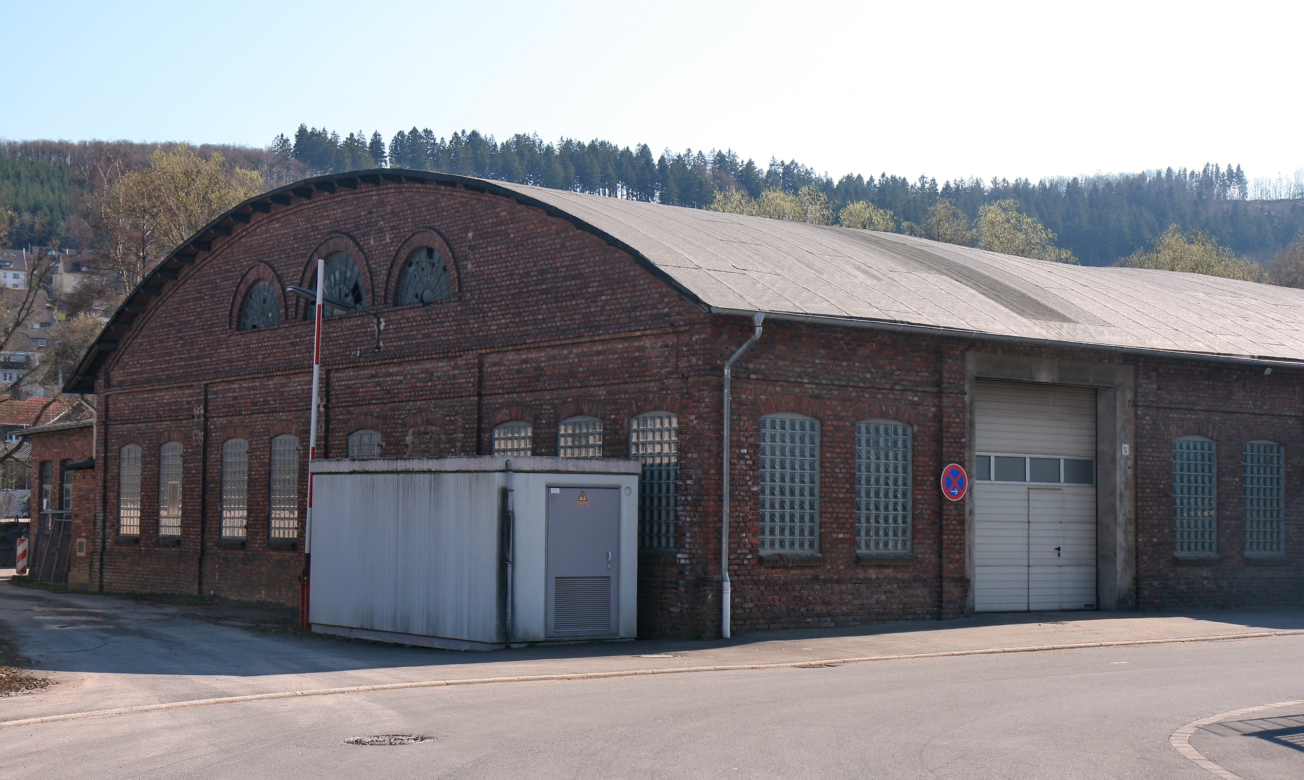 Ehemaliger Lokschuppen der Plettenberger Kleinbahn in Plettenberg, Posensche Straße 11. This image shows a heritage building in Germany, located in the North Rhine-Westphalian city Plettenberg (no. 108).